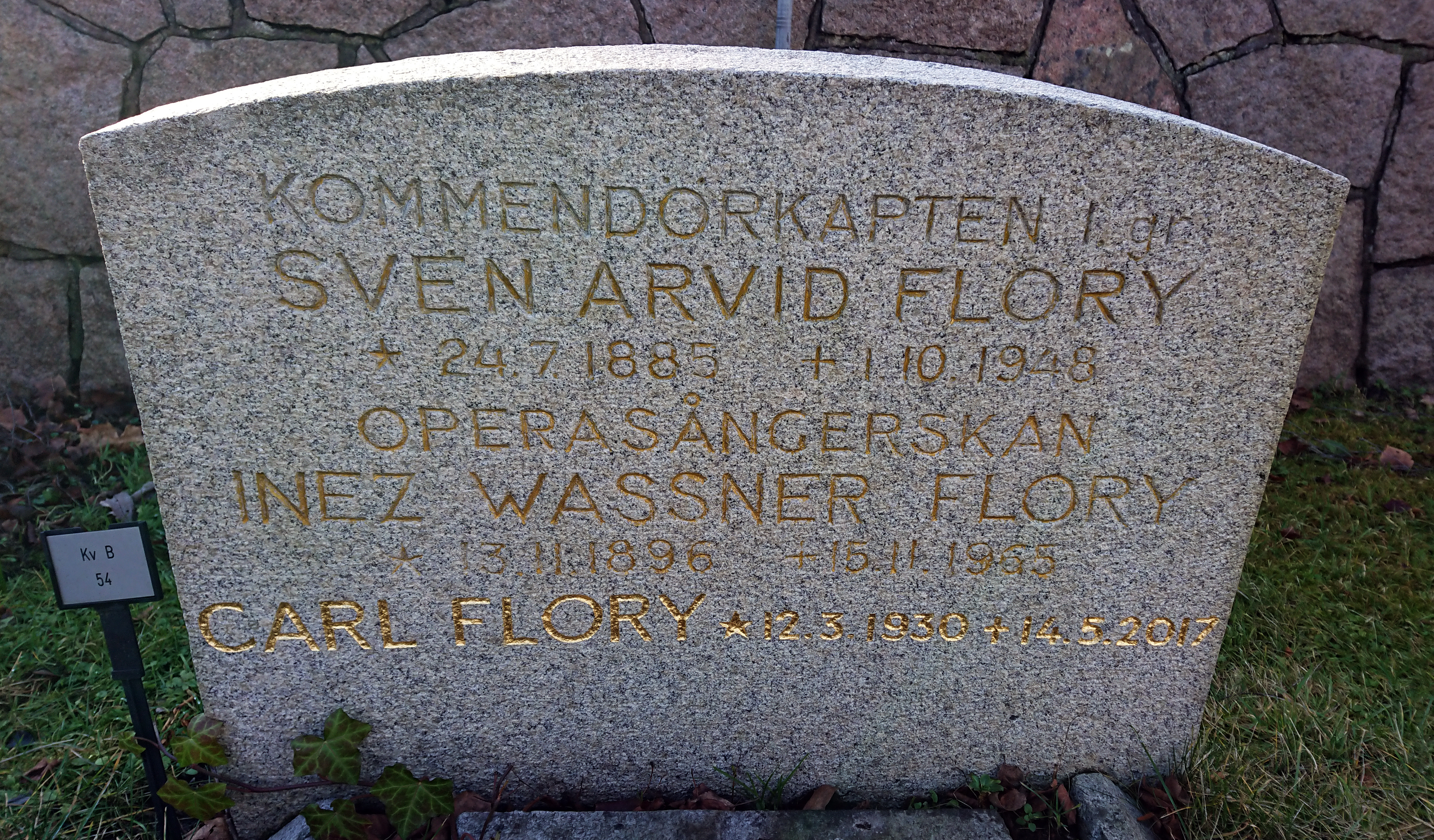 Gravsten för Sven Arvid Flory på Galärvarvskyrkogården